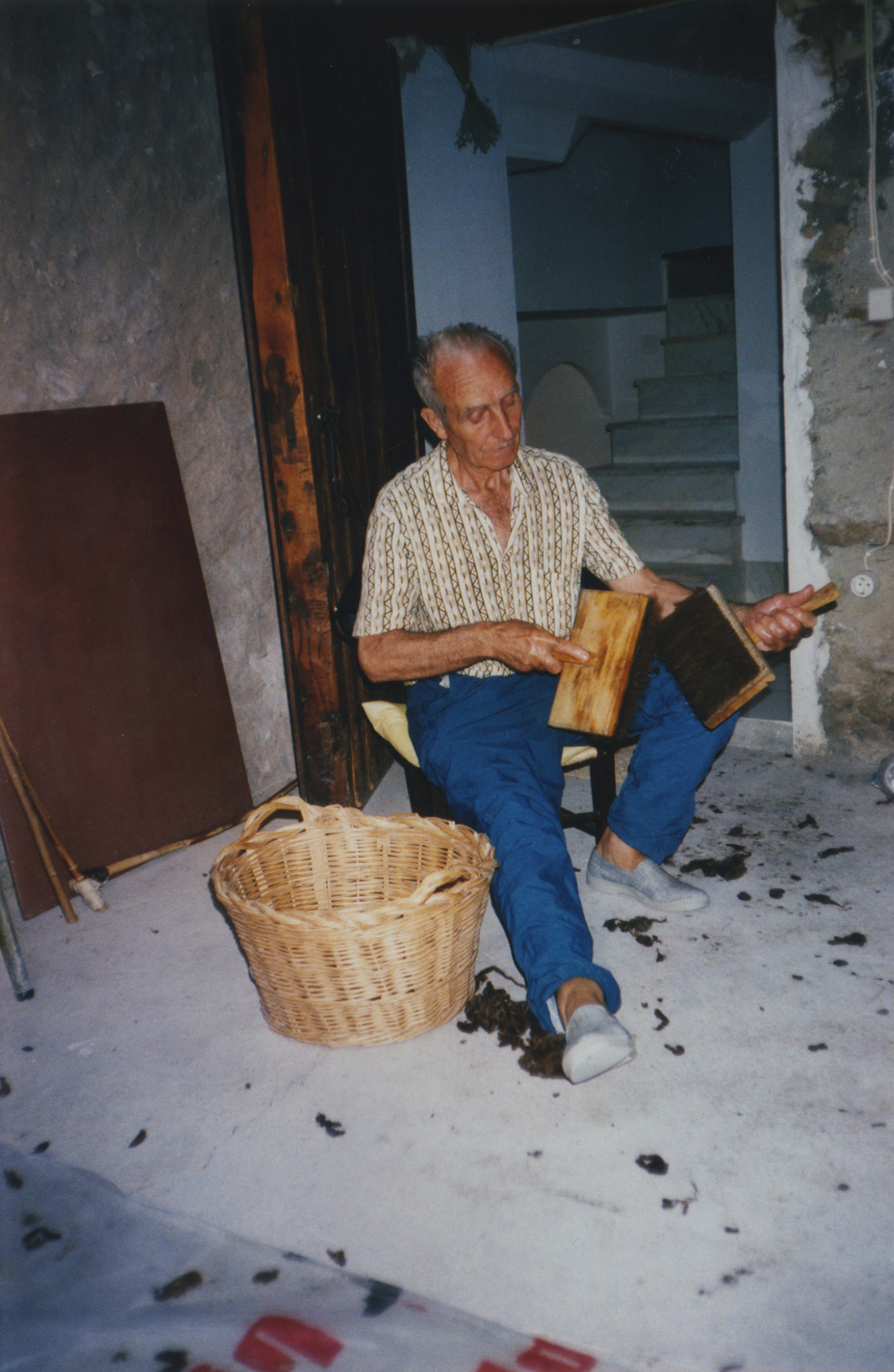 Proceso previo a la realización o utilización del hilado de la lana.